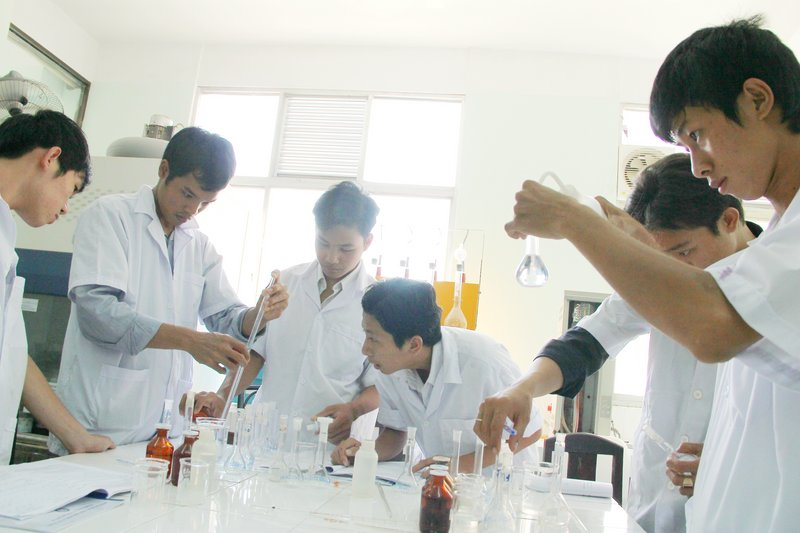 Sinh viên Hutech học tập và nghiên cứu khoa học